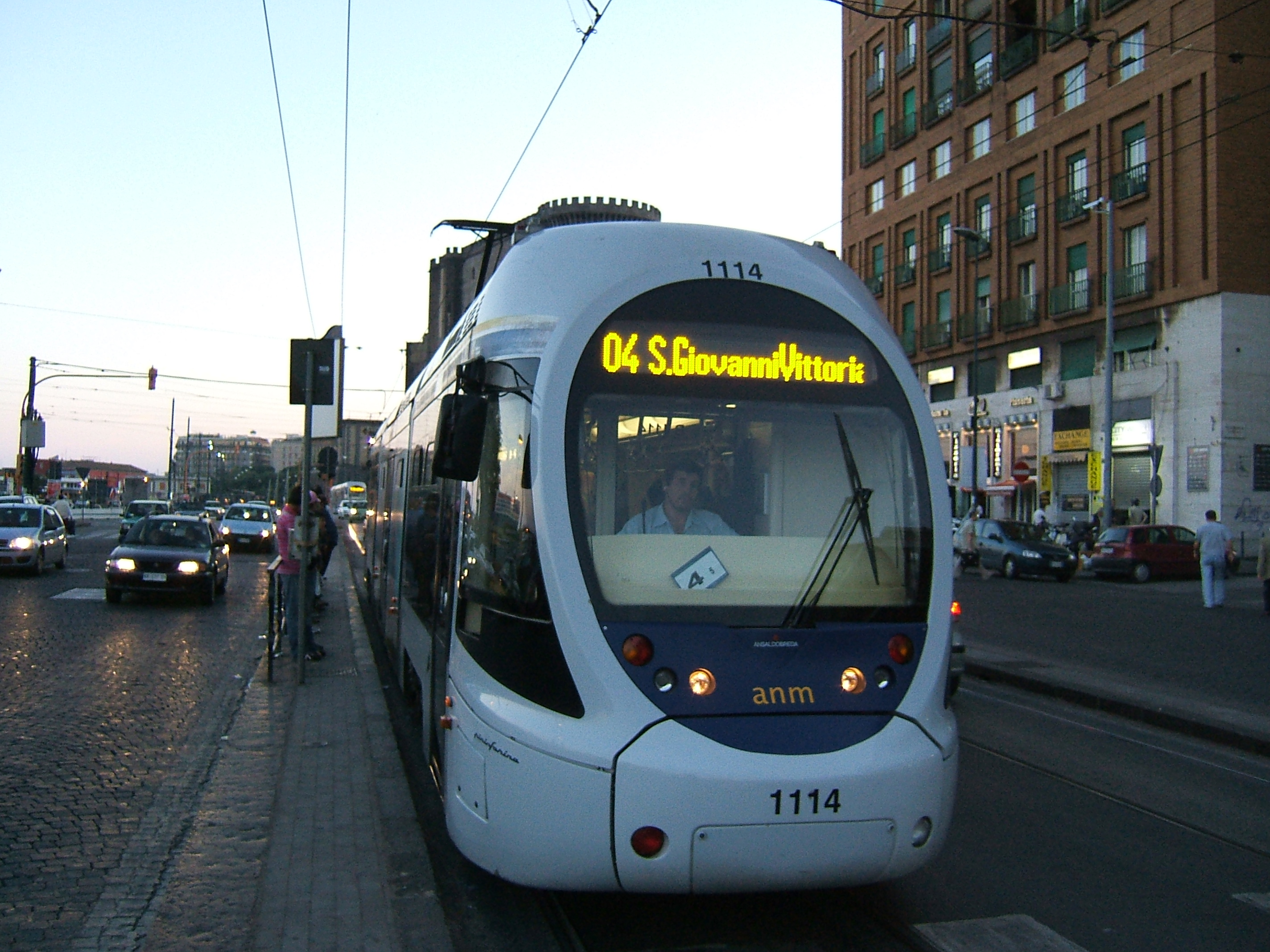 Neapolská tramvaj Sirio zepředu